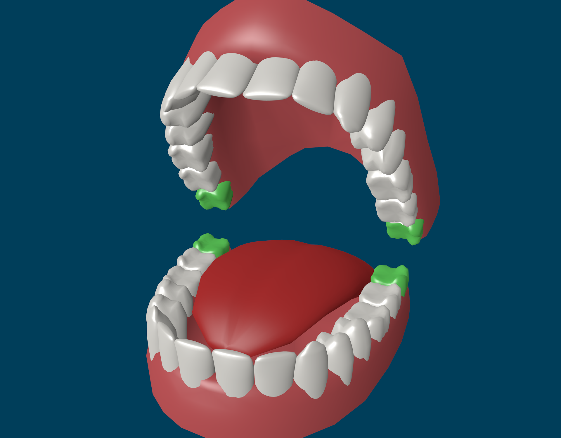 Модель зубов человека. Зеленым цветом обозначены зубы "мудрости"